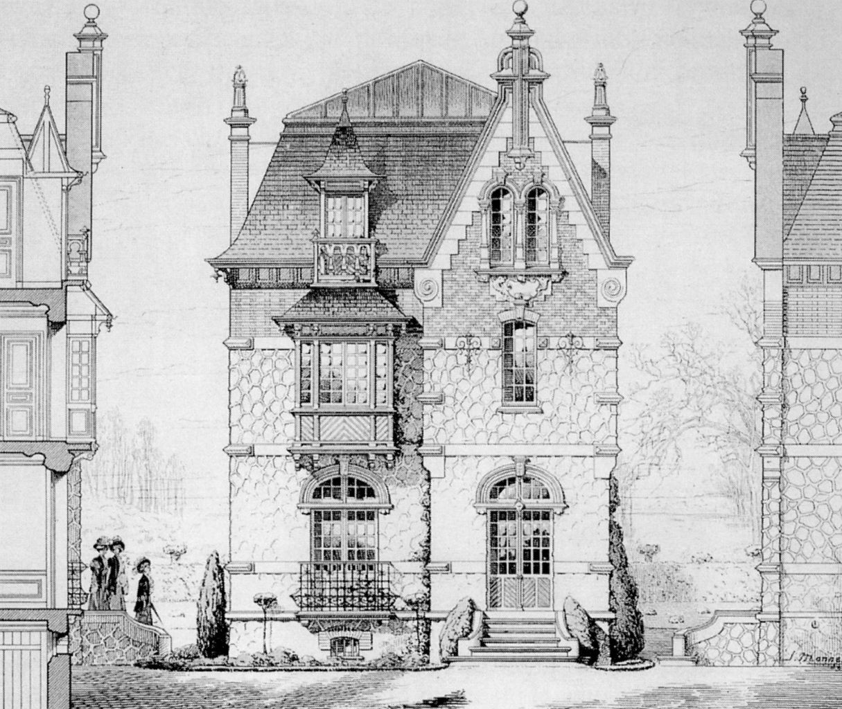 « Villa urbaine à Enghien » - Enghien-les-Bains (Seine-et-Oise, France) - Planche architecturale du 56, boulevard Cotte